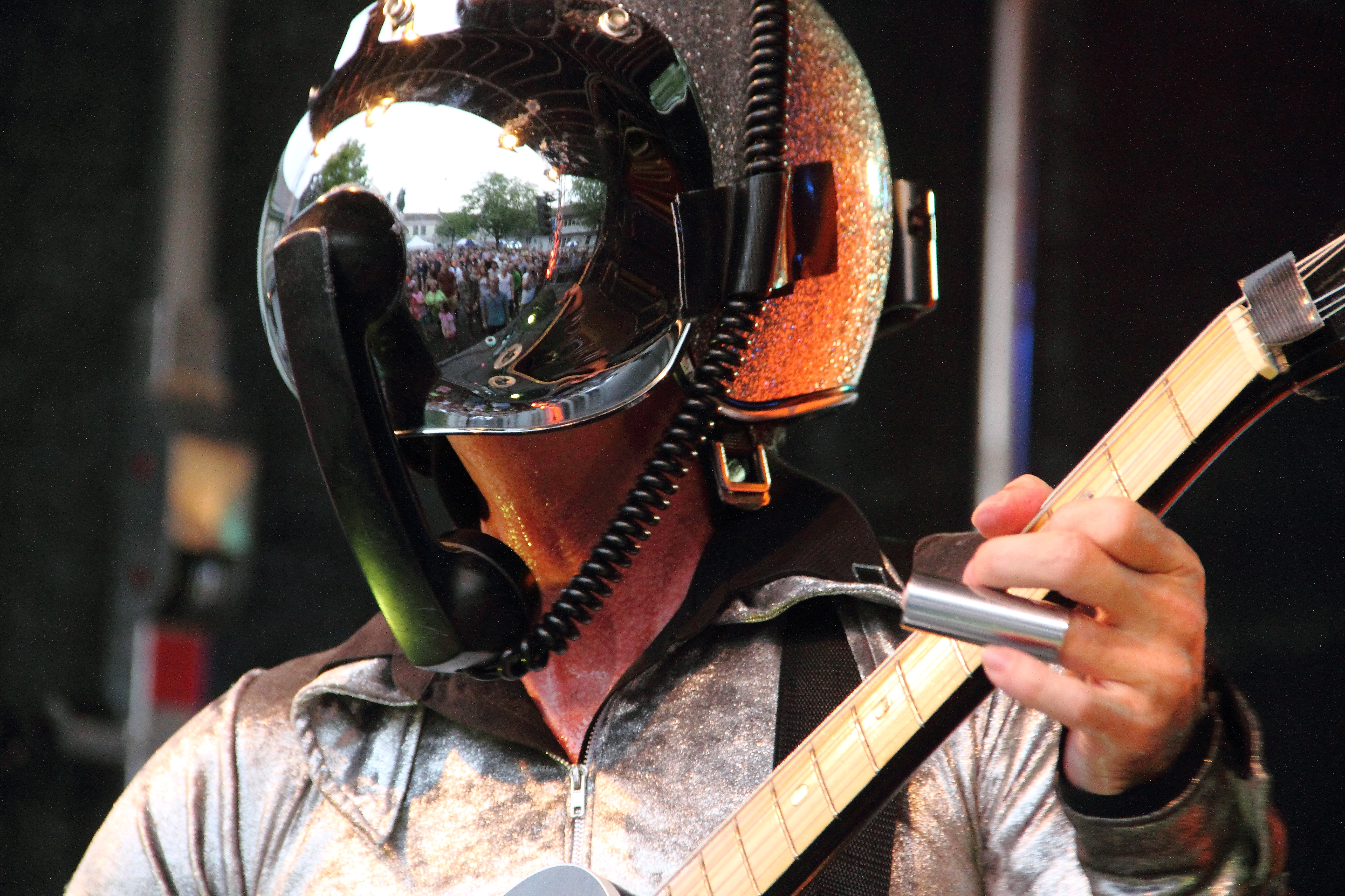 Bob Log III im Konzert anlässlich 50 Jahre Manufaktur Schorndorf.